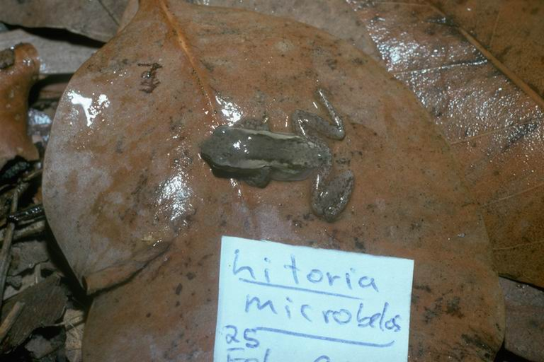 Litoria microbelos